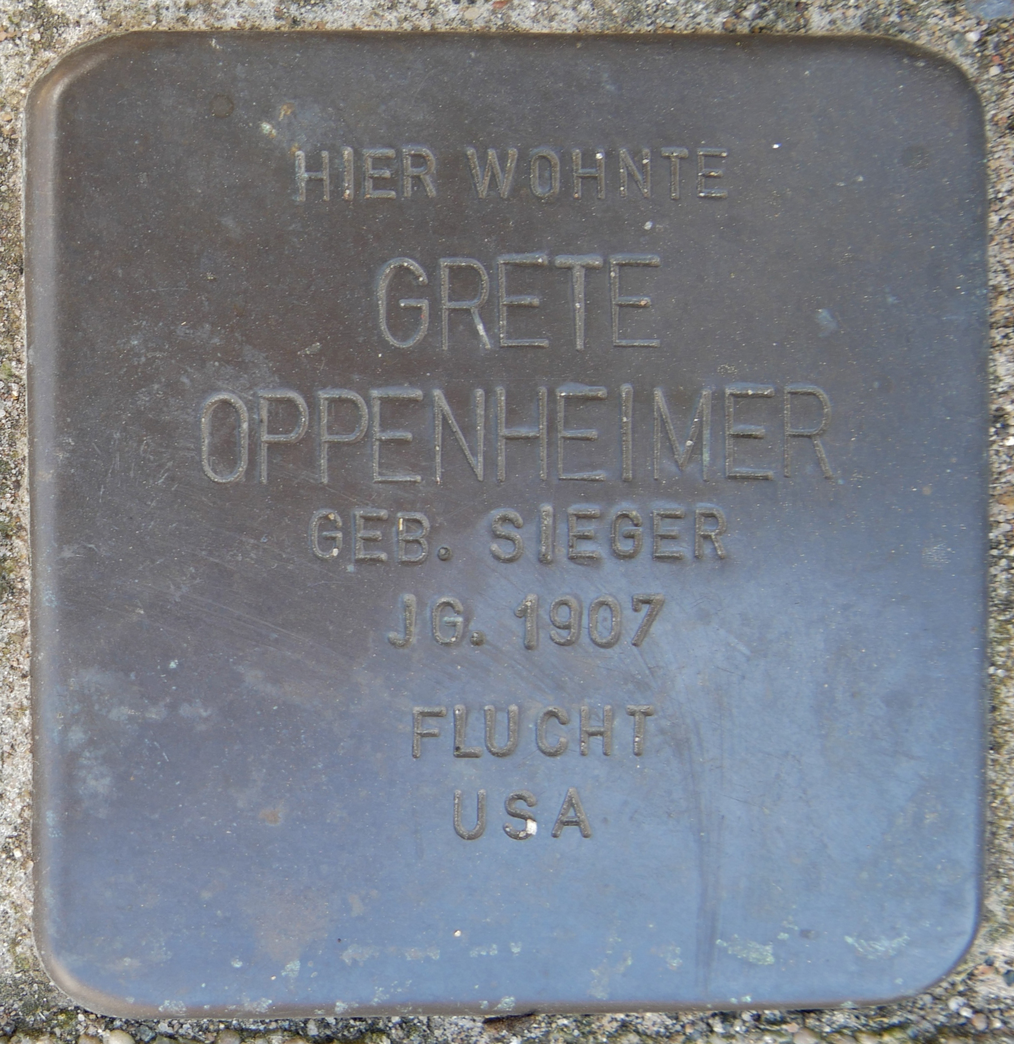 Stolpersteine Wesel: Oppenheimer, Grete